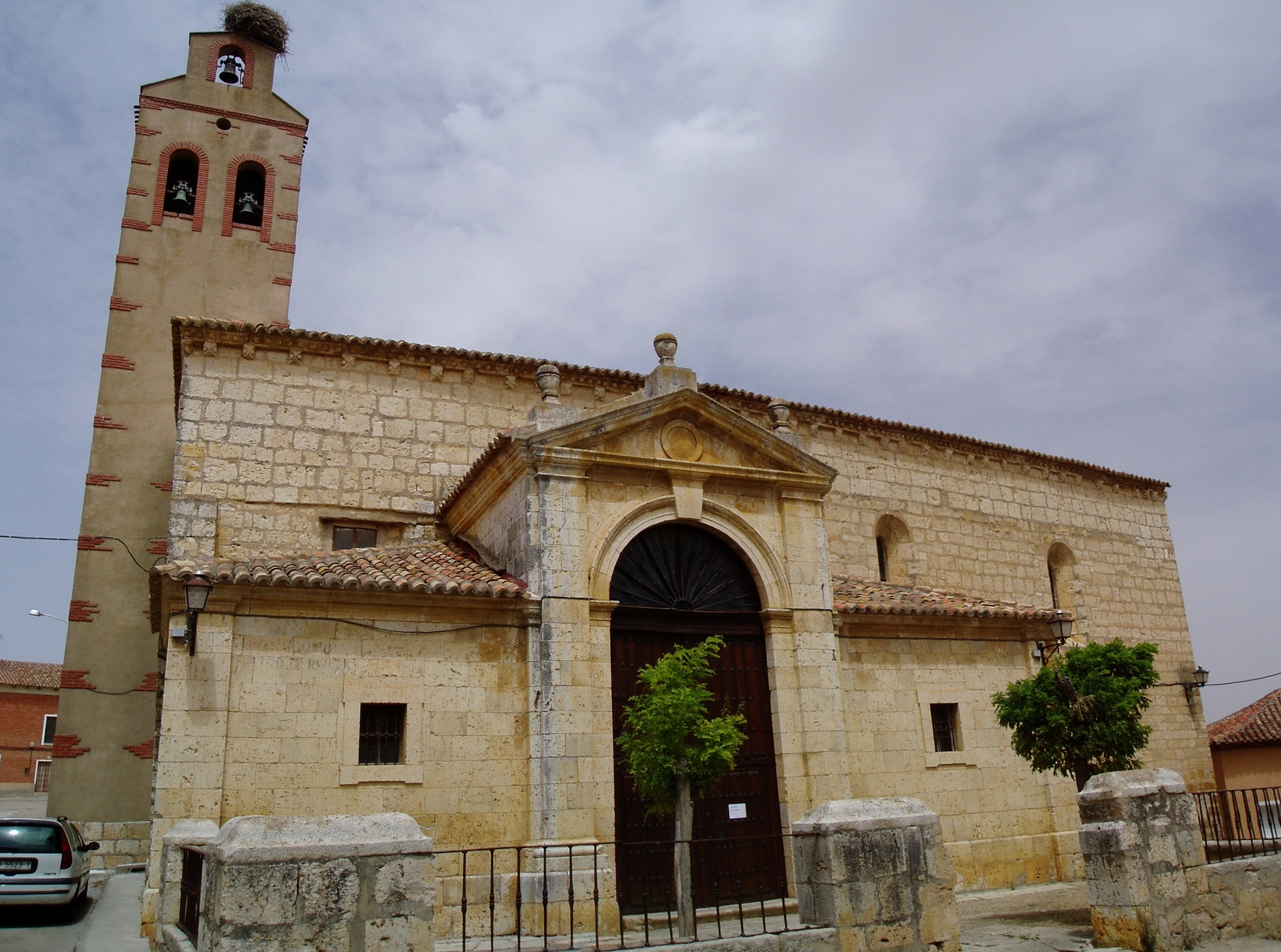 Fachada principal de la Iglesia de Santa María de Torrelobatón, provincia de Valladolid (España).